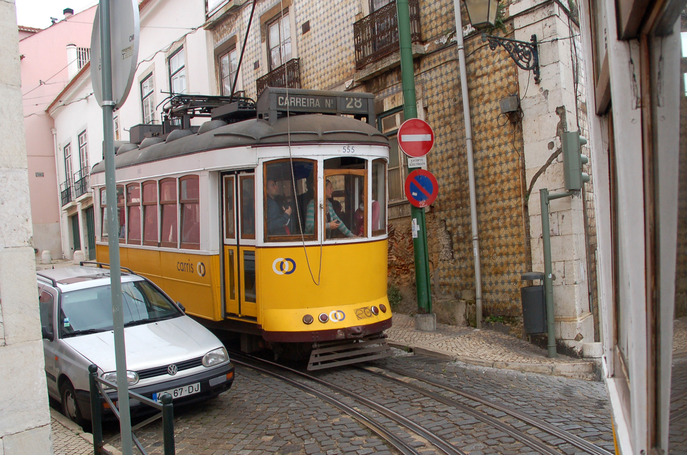 Linie 28 -Martim Moniz – Graça – Estrela – Prazeres : in den engen Gassen ist kein anderes Verkehrsmittel so geeignet wie die straßbahn